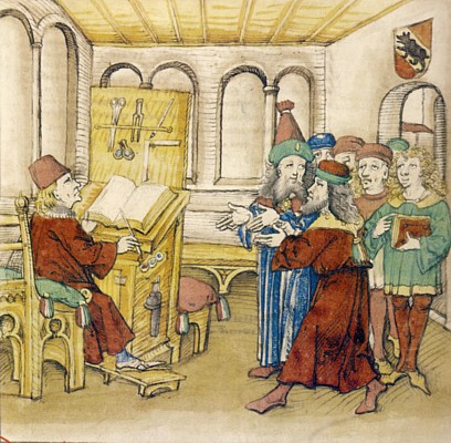 Der Chronist Diebold Schilling in seinem Schreibatelier, Autoren-Porträt in der Spiezer Chronik, Burgerbibliothek Bern, Mss. h.h. I 16, S. 41.